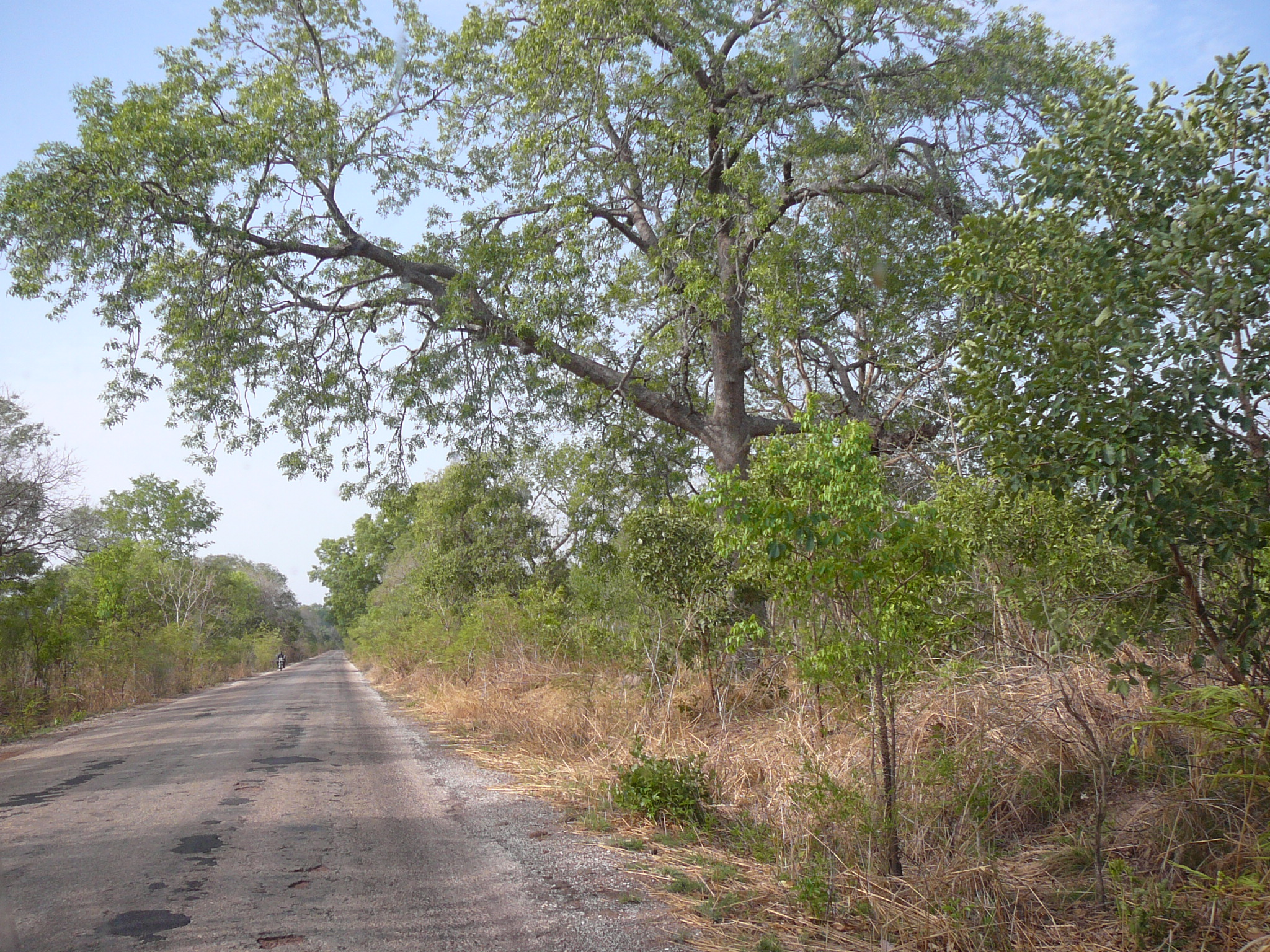 Süduferstraße zwischen Dumbutu und Wurokang in der Nähe des Mutaro Kunda Forest Park, Gambia